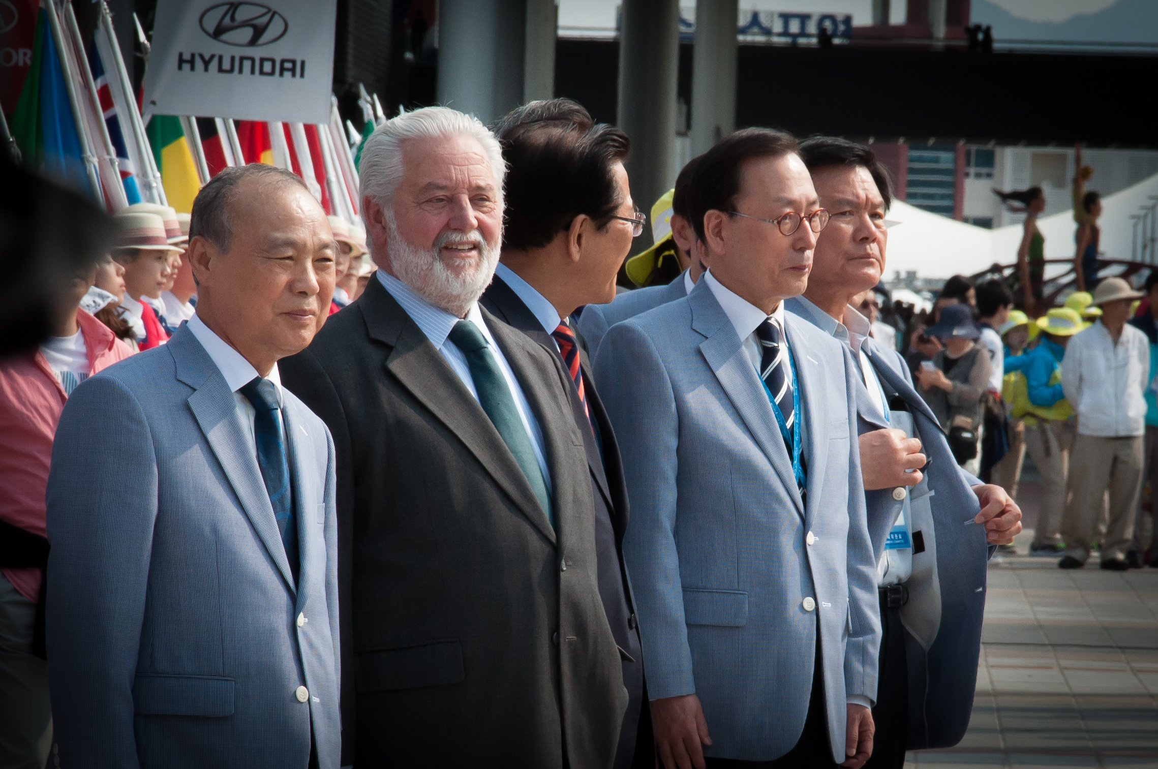 Dr. González Loscertales durante la apertura oficial al público de la Expo 2012 Yeosu.